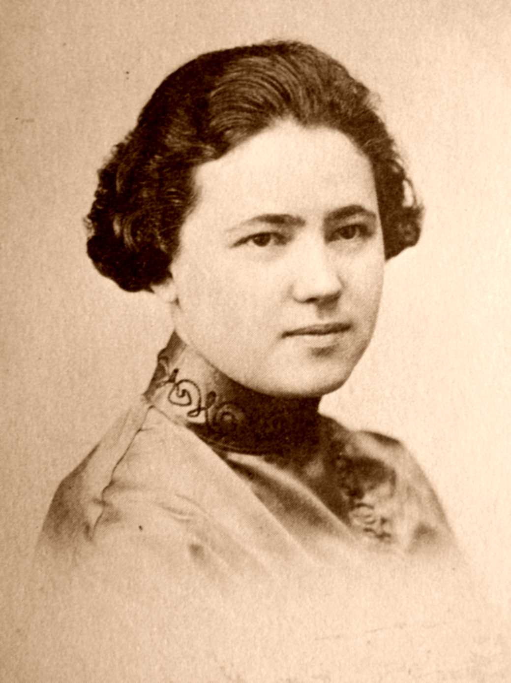 Mollie Steimer, né le 21 novembre 1897 à Dunaevtsky (Ukraine) et morte le 23 juillet 1980 à Cuernavaca (Mexique), est une militante anarchiste d'origine juive.